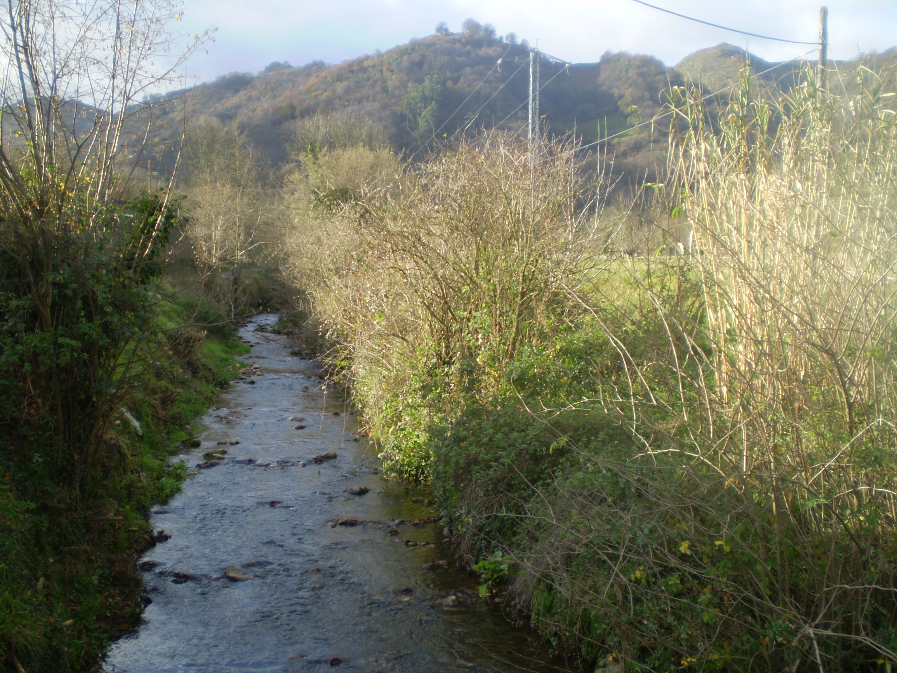 rio Sama